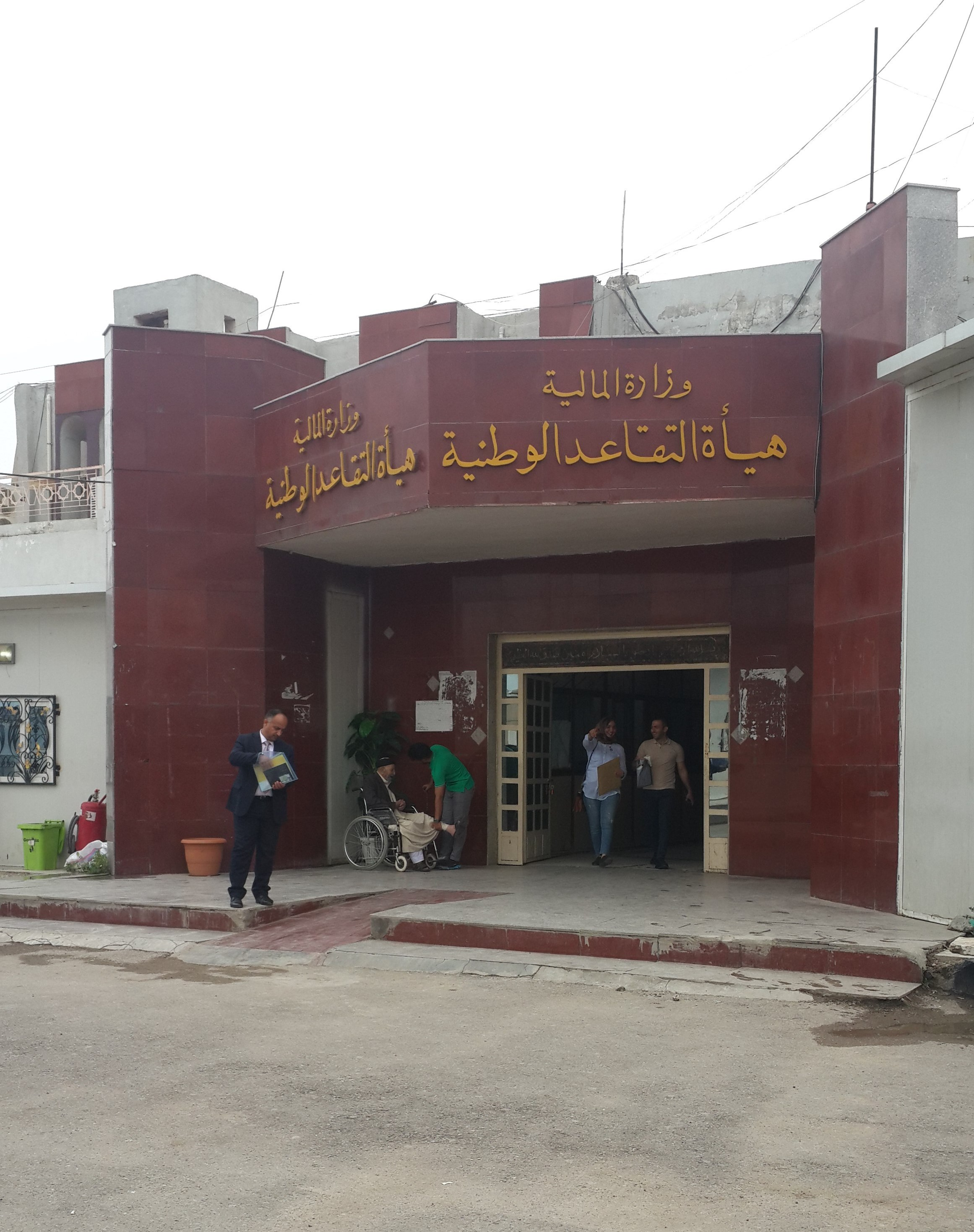 مبنى هيأة التقاعد الوطنية - وزارة المالية في بغداد